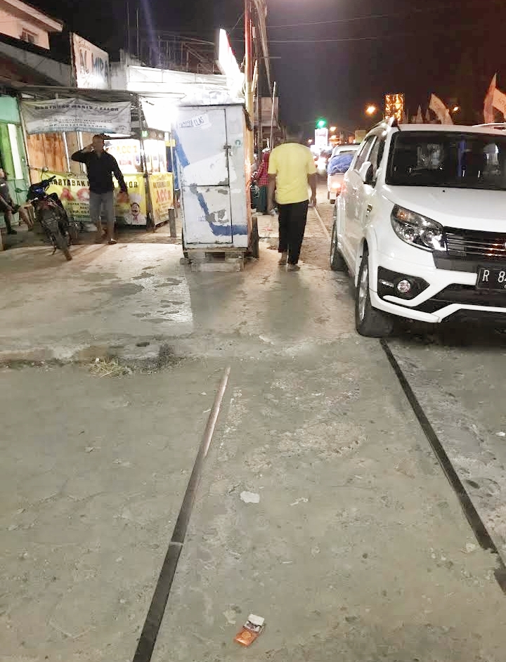 Bekas rel kereta api di mandiraja